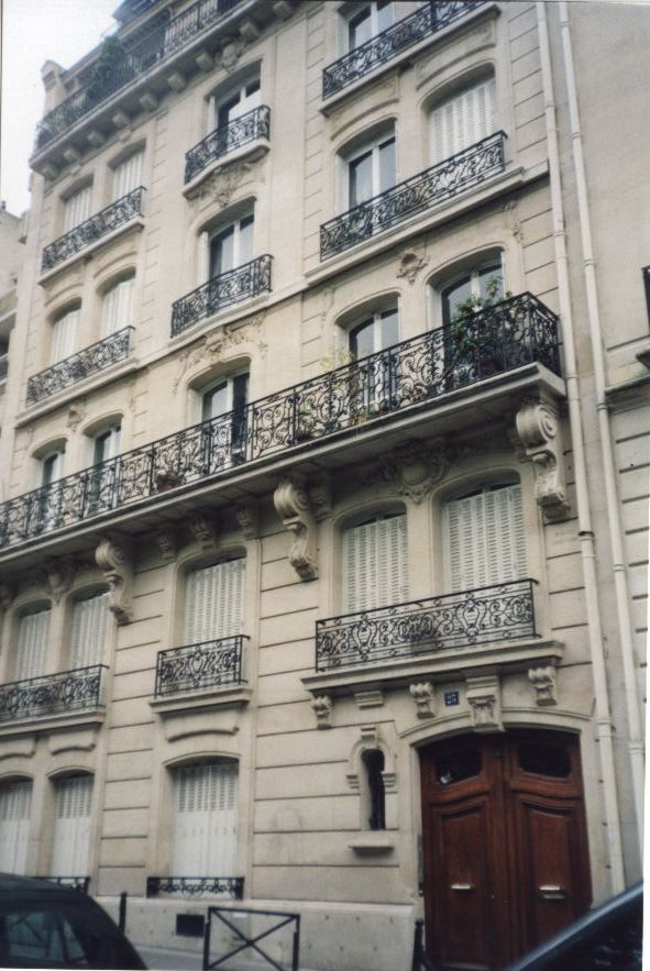 25 rue decamps, 75116 Paris, France.